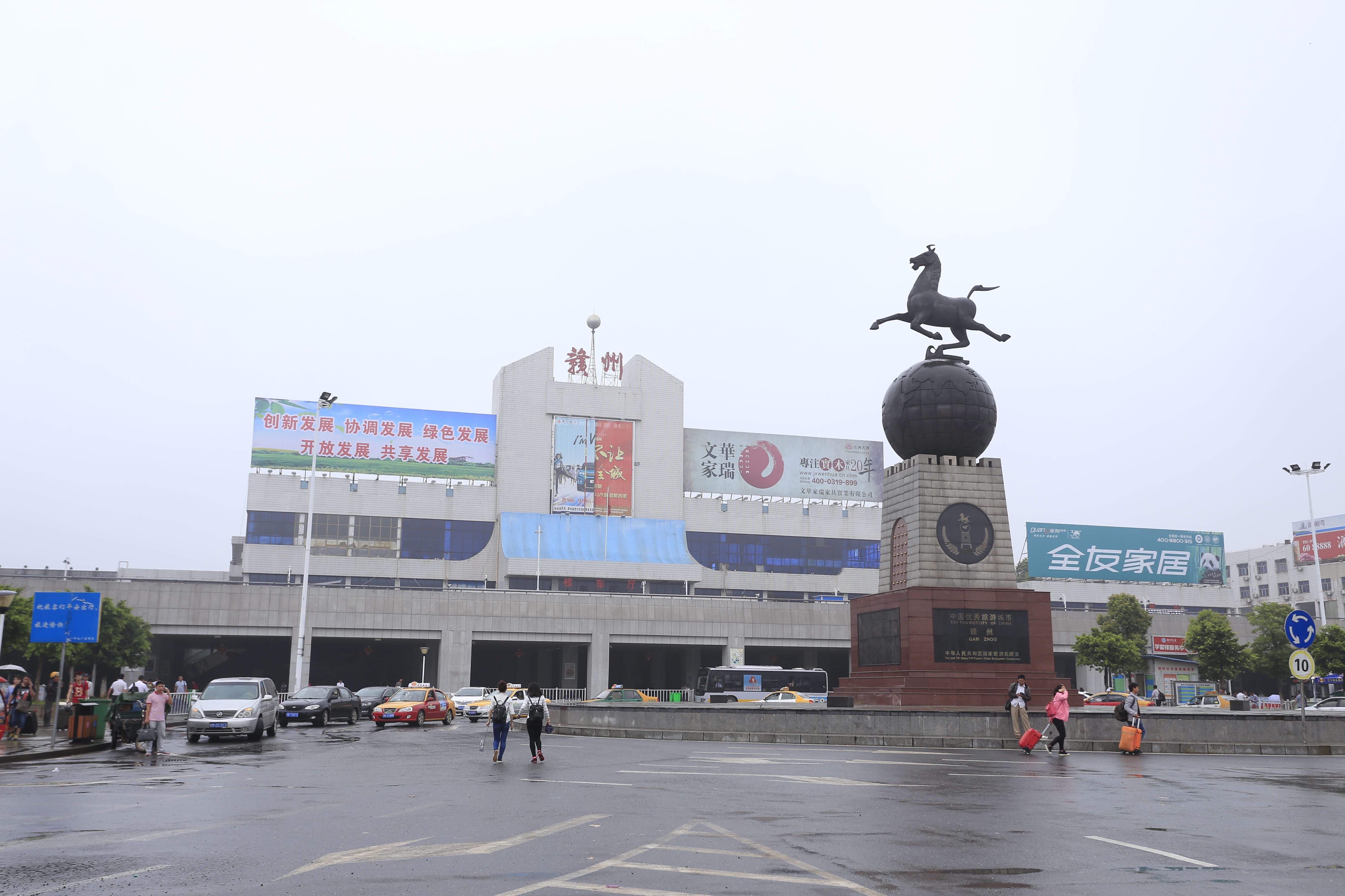 赣州火车站